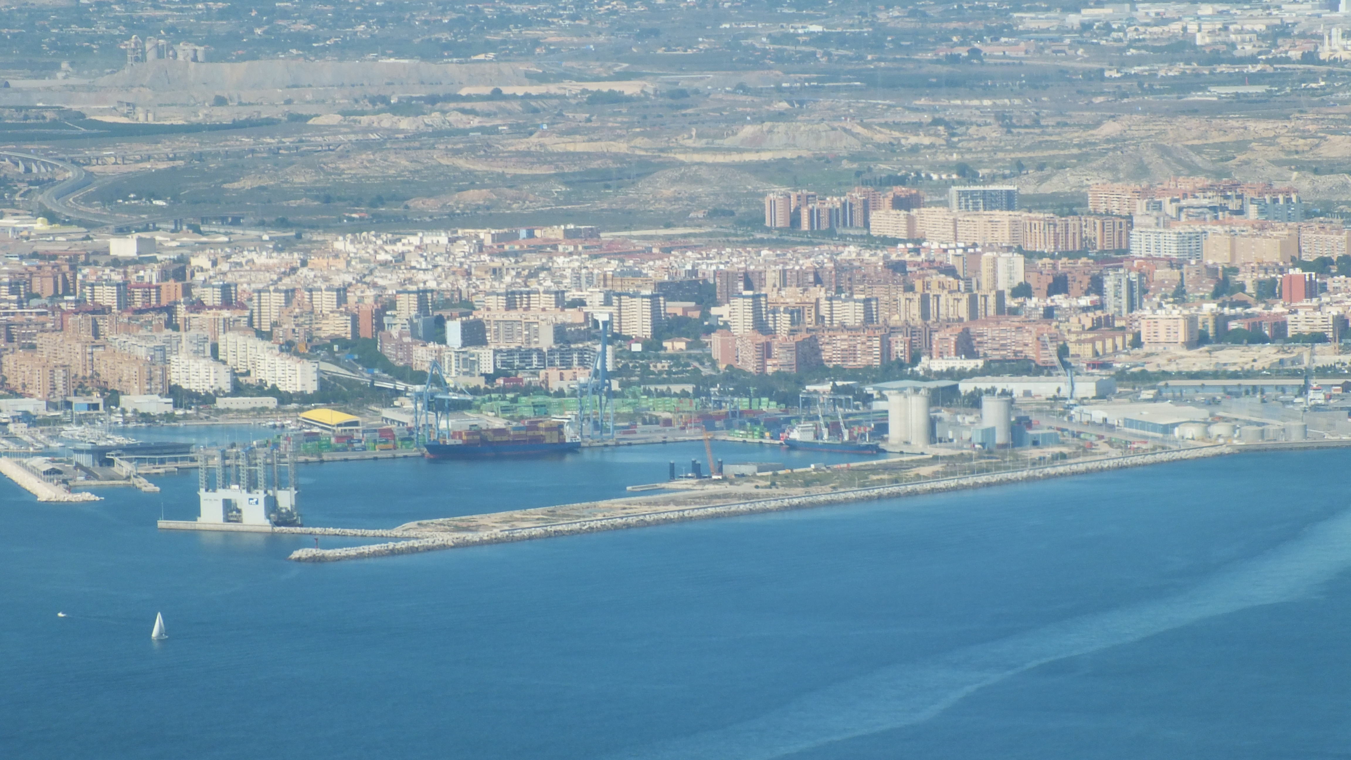 Порт города Аликанте, вид из окна самолёта за 1 минуту до снижения. 2 октября 2019 года 14:06, рейс S7 Airlines Домодедово (DME) — Аэропорт Аликанте-Эльче (ALC)